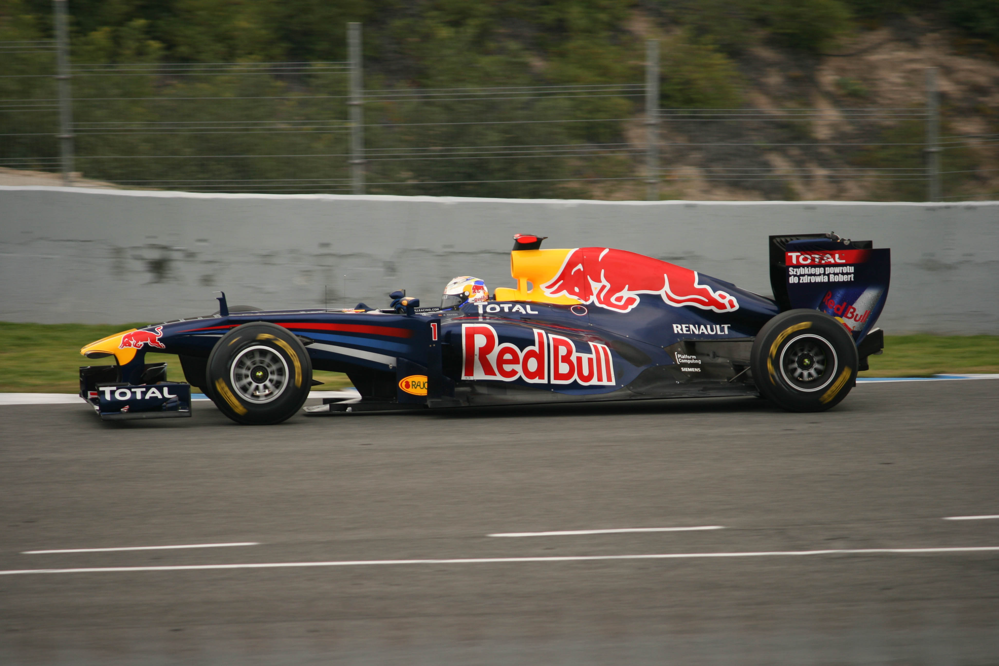 Vettel